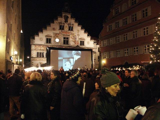 Bei einem Winter-Open-Air-Kino vor dem Alten Rathaus in Lindau wird der Film "Die Feuerzangenbowle" mit einer aufblasbaren Leinwand (AIRSCREEN) gezeigt